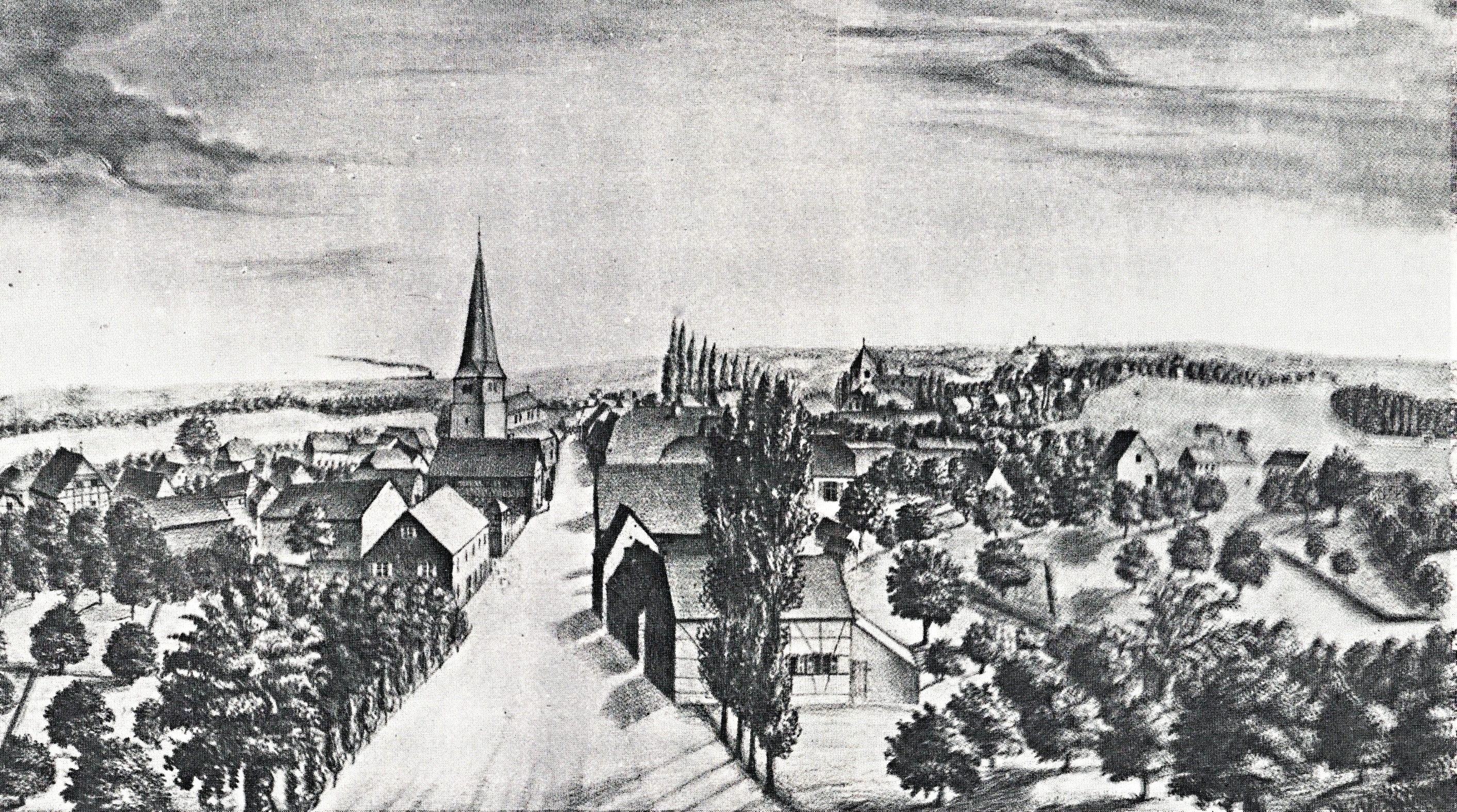 Деревня Хильден. Литография.